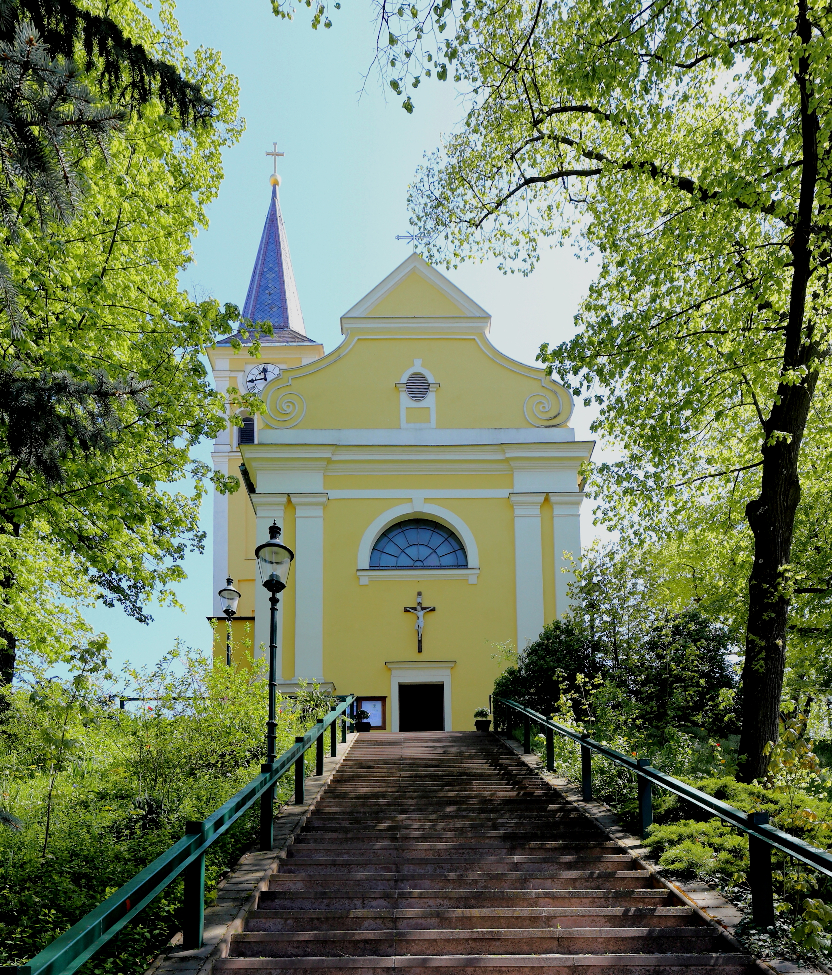 Westansicht der römisch-katholischen Pfarrkirche hl. Koloman in der niederösterreichischen Marktgemeinde Ebenthal.Der Sakralbau wurde im 17. Jahrhundert in erhöhter Lage im Südosten des Ortes errichtet. Von 1831 bis 1840 wurde die Kirche umgebaut und erweitert. Die Westfassade mit Doppelpilastern und einem großen, zentralen Lunettenfenster ist spätklassizistisch.